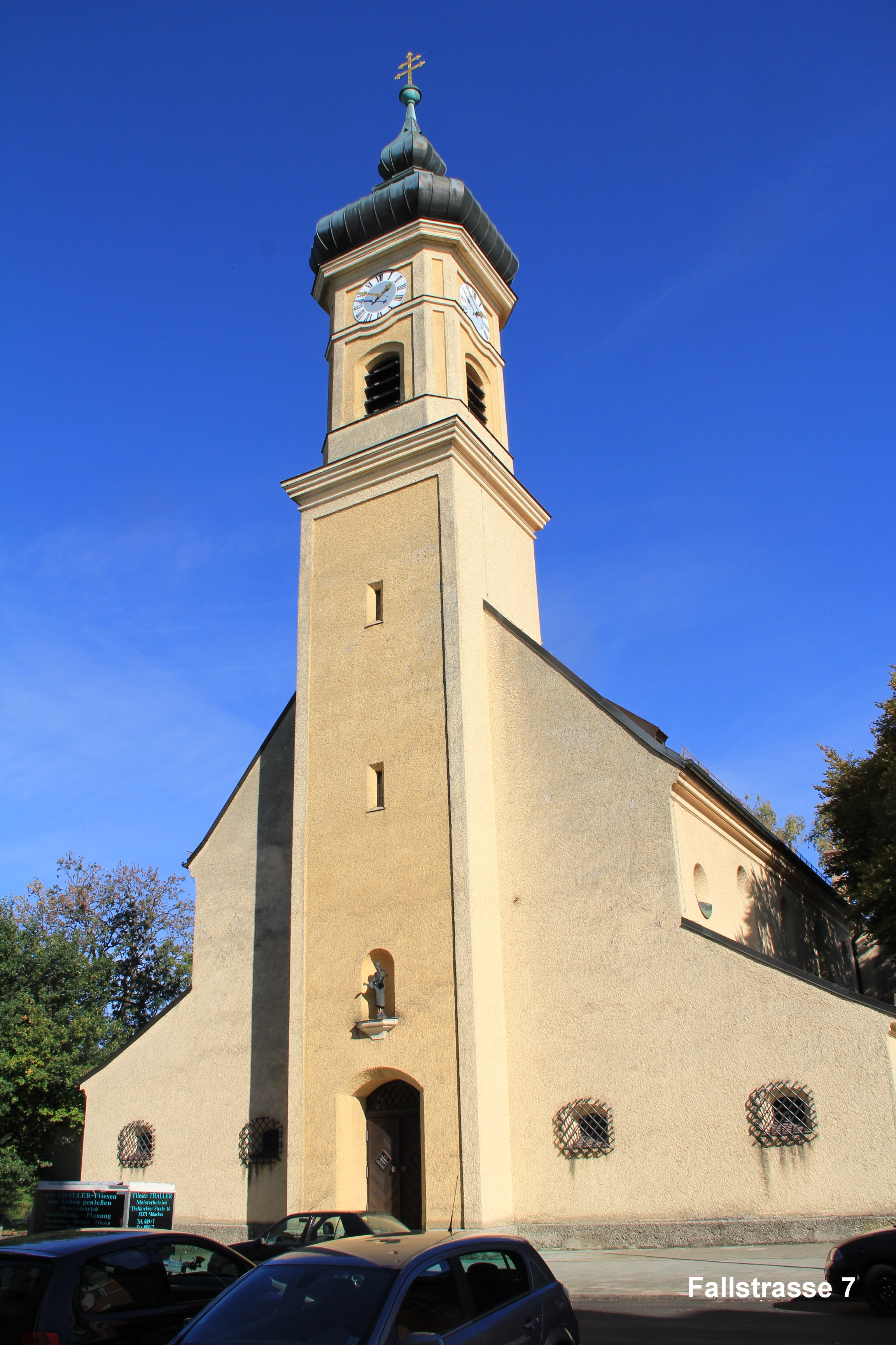 München Sendling